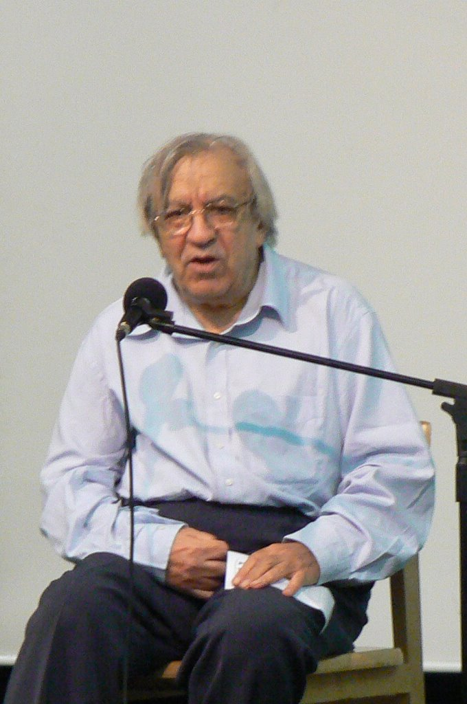 سخنرانی پرویز رجبی در خانه شهریاران جوان در همایش تیرگان